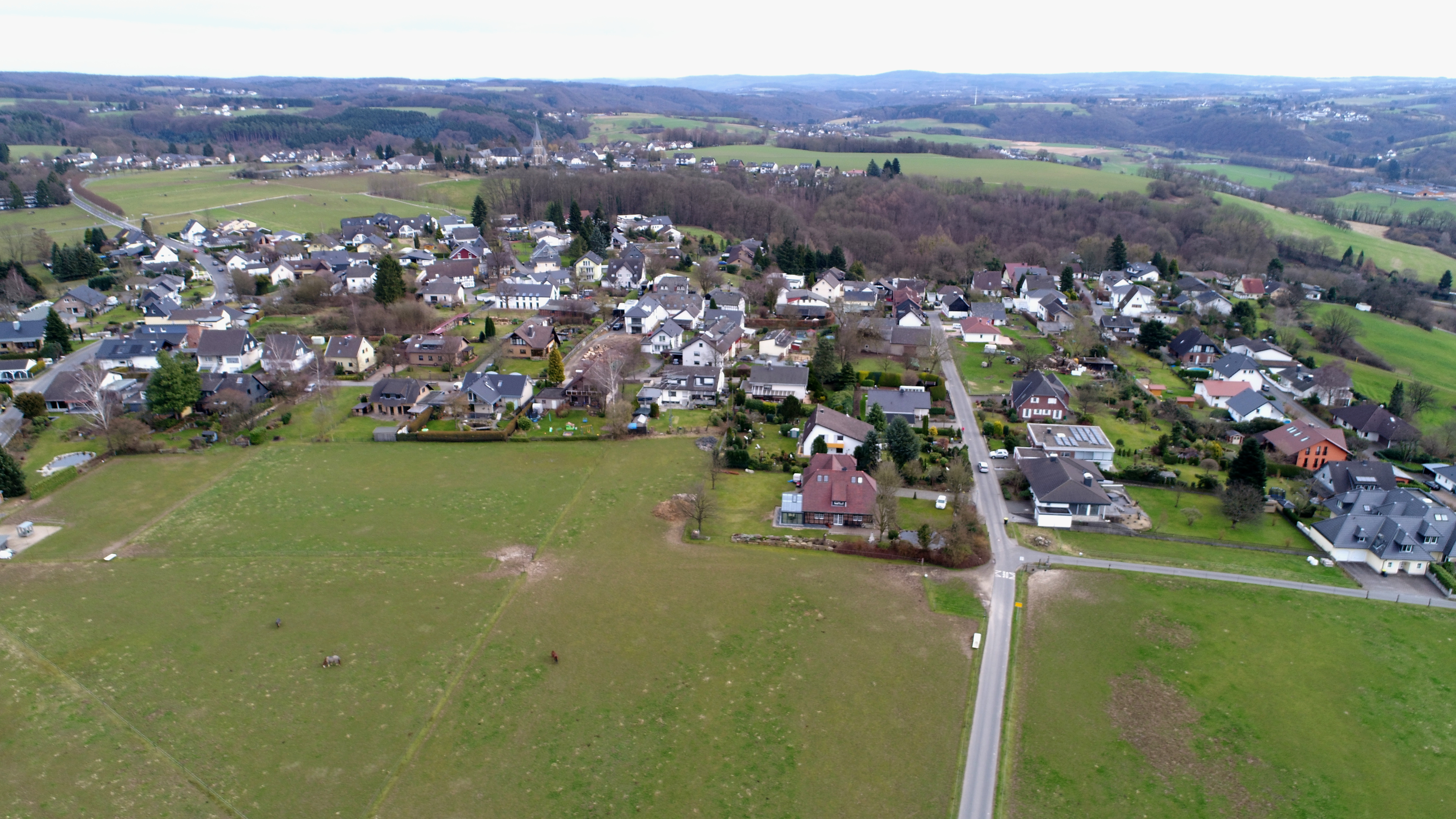 Altenbödingen, Stadt Hennef (Sieg): Luftaufnahme (2017)